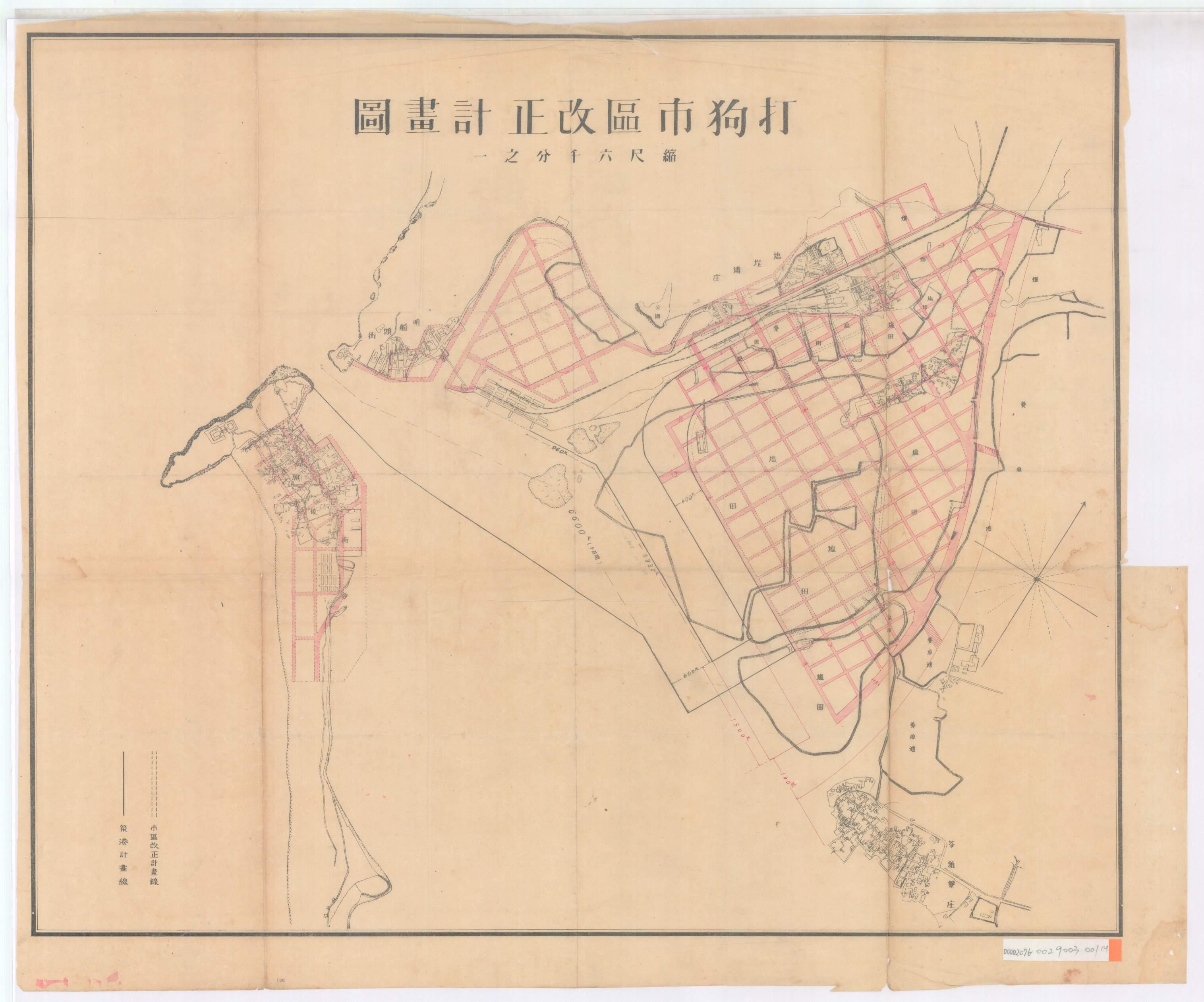 中文（台灣）: 此為1912年的打狗市區計畫變更，相較於1908年的計畫只有鹽埕一帶，此計畫擴大許多。